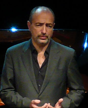 Лоран Наури выступает в Баку, Азербайджан